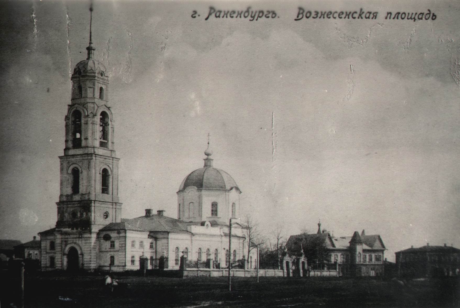 Чаплыгин. Вознесенская площадь.